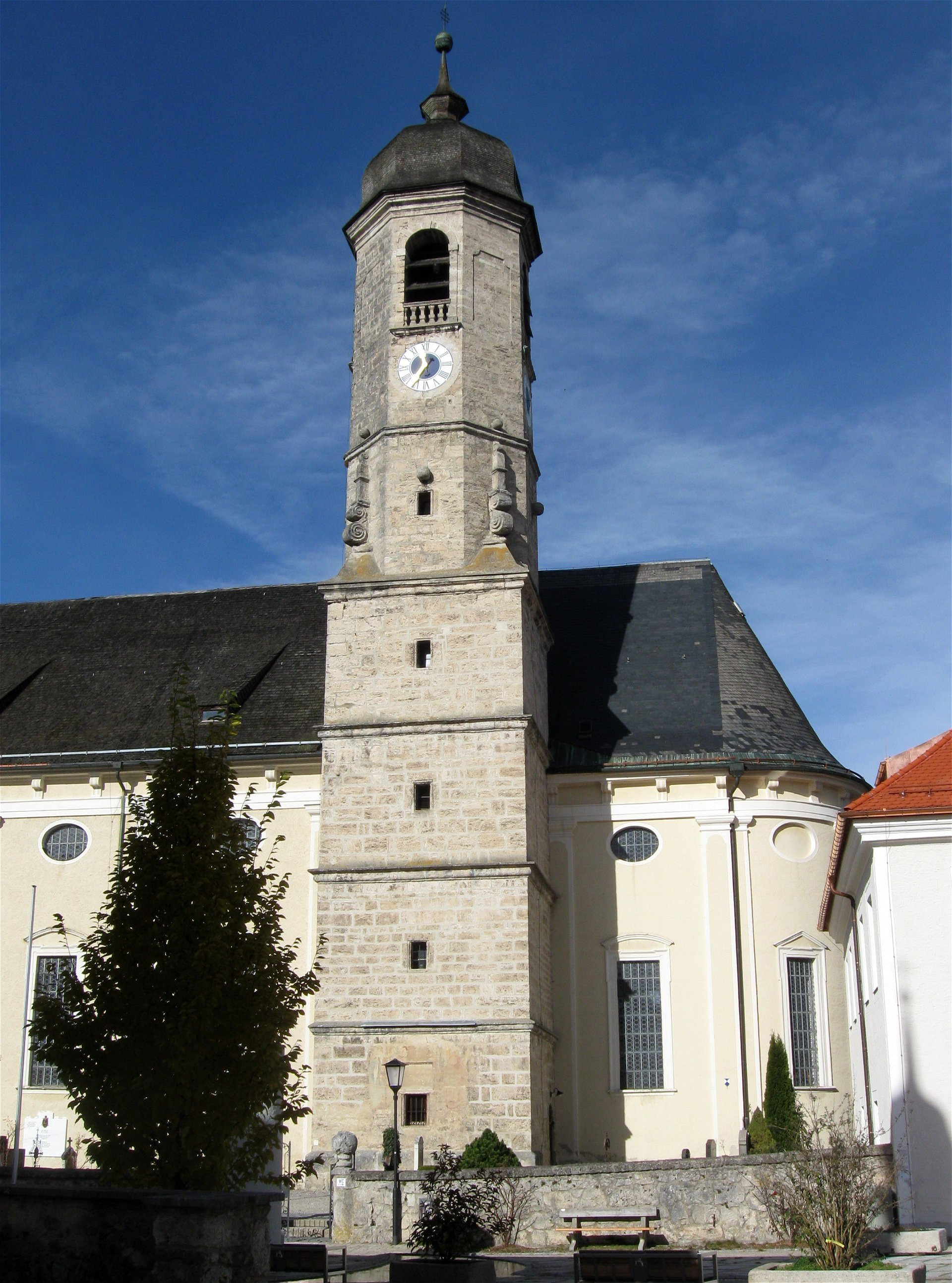 Ignaz-Günther-Straße 3, Weyarn; Ehemalige Augustinerchorherren-Stiftskirche St. Peter und Paul, jetzt Pfarrkirche, Wandpfeilerkirche mit Südturm aus Tuffsteinquadern, barocker Neubau von Lorenzo Sciasca, 1687-1693, Turmunterbau um 1630, Oberteil 1713, nördlich angebaute Sakristei mit darüberliegendem Kapitelsaal, sowie anschließendem Korridorbau mit ehemaligem Kreuzgang, mit Ausstattung. D-1-82-137-5